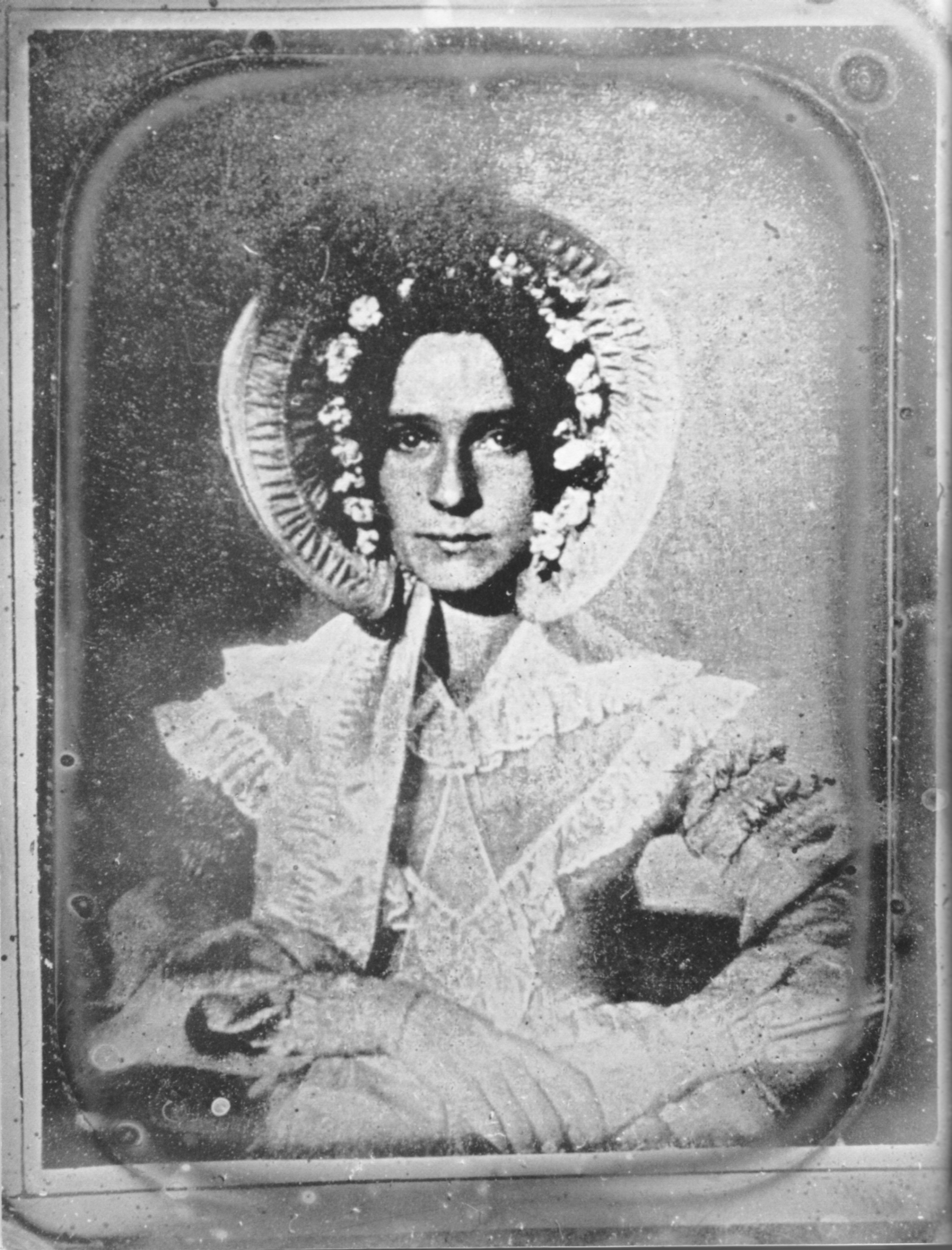 Dorothy Draper, Schwester des Wissenschaftlers John William Draper. Ältestes erhaltenes Porträtfoto der Welt.